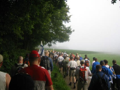 4-Deeg Marsch zu Nimwegen (Nijmegen).